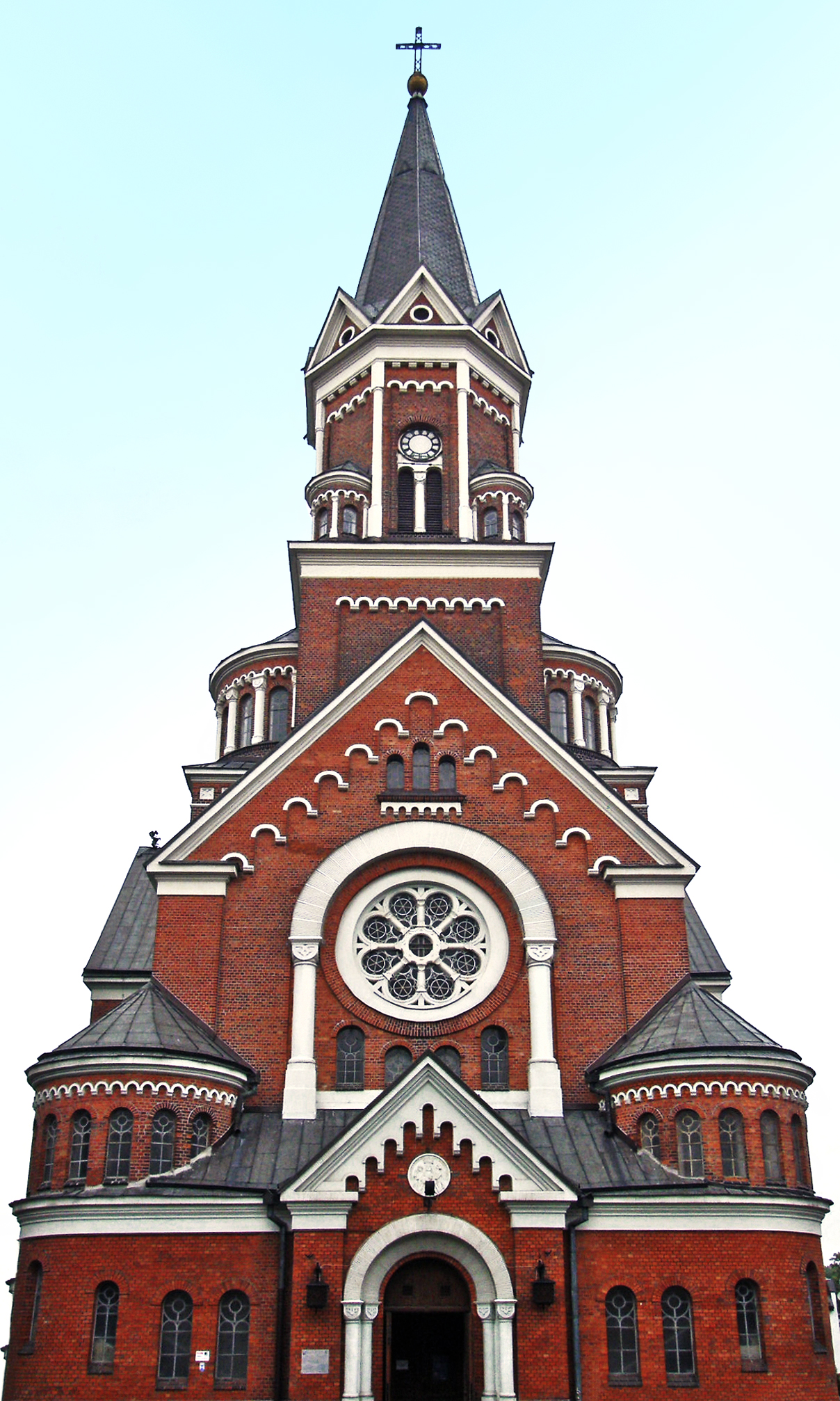 Białystok ul. Warszawska 46 - Kościół parafialny p.w. św. Wojciecha (zabytek nr A-206 z 6.12.1969)